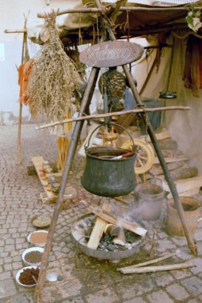 Esslingen - Weihnachtsmarkt - Färberei